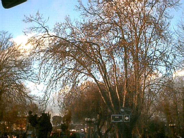 Arboles en penco